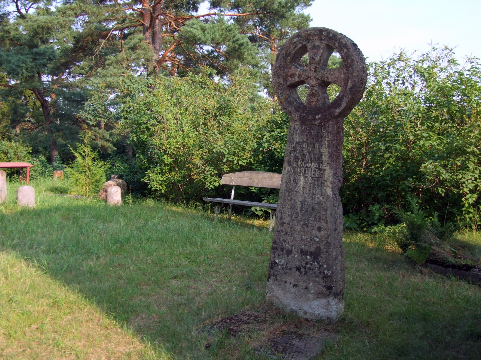 Jēkabnieku riņķa krusts- The Cross of Ring